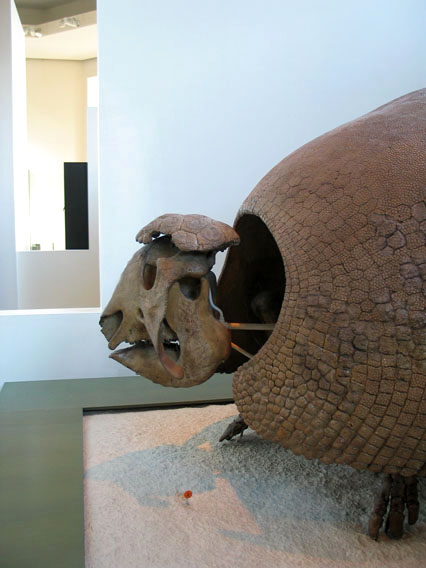 Fossil Glyptodon